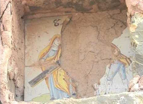 Ceràmica del Calvari d'Artesa